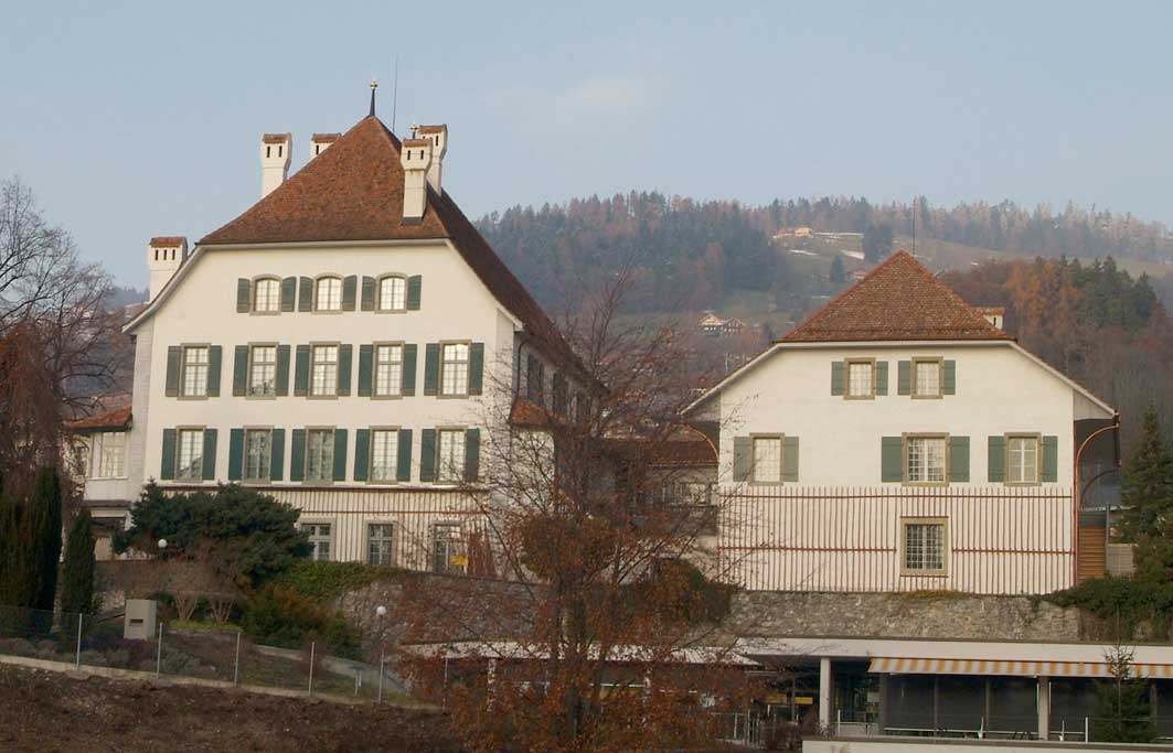 Wichterheer-gut in Oberhofen, Bern, Switzerland